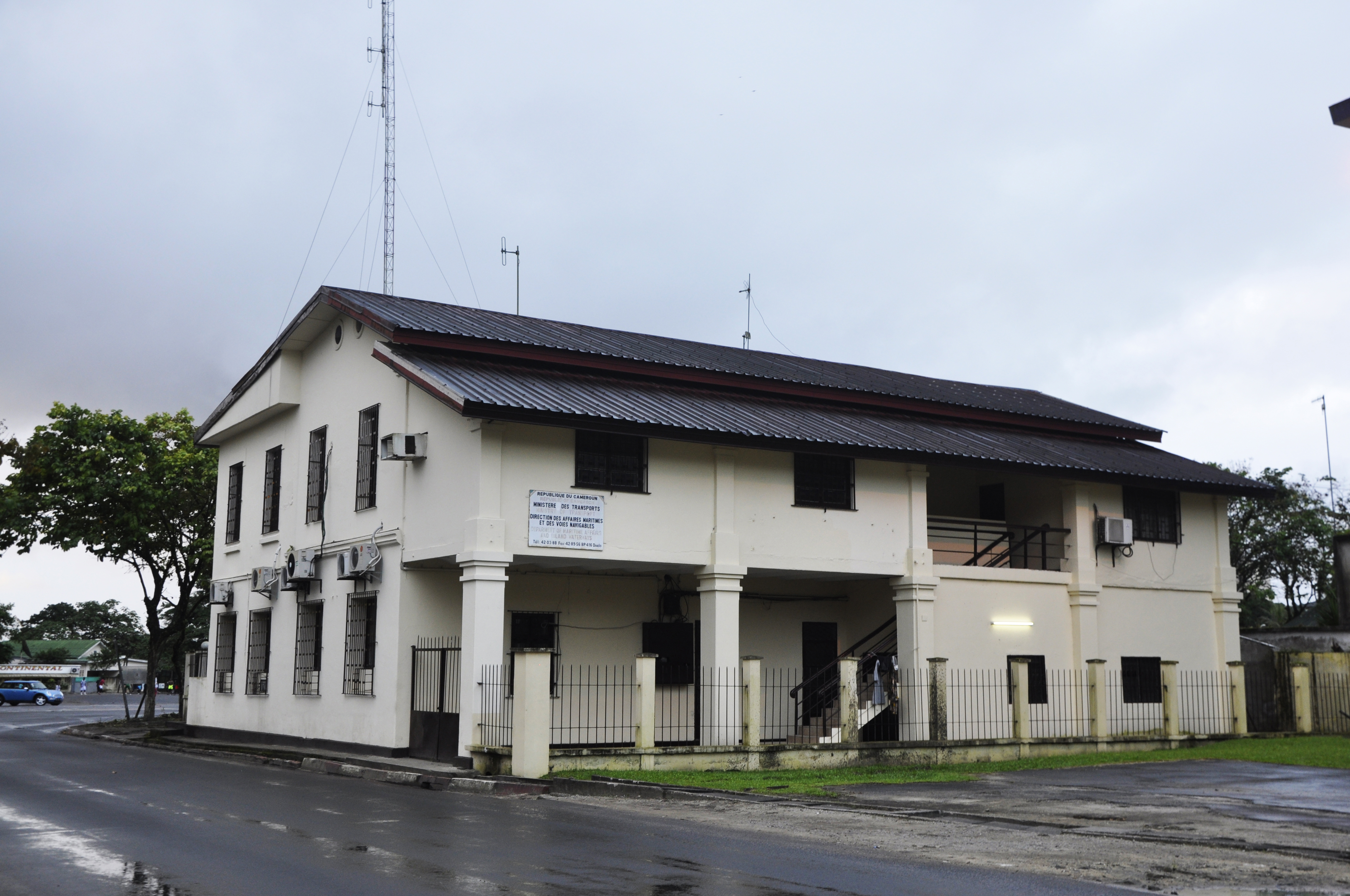 Ancien commissariat de police